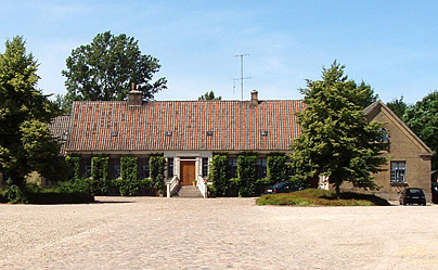 Hanstedgård er en herregård ved Horsen, Århus Amt, Danmark